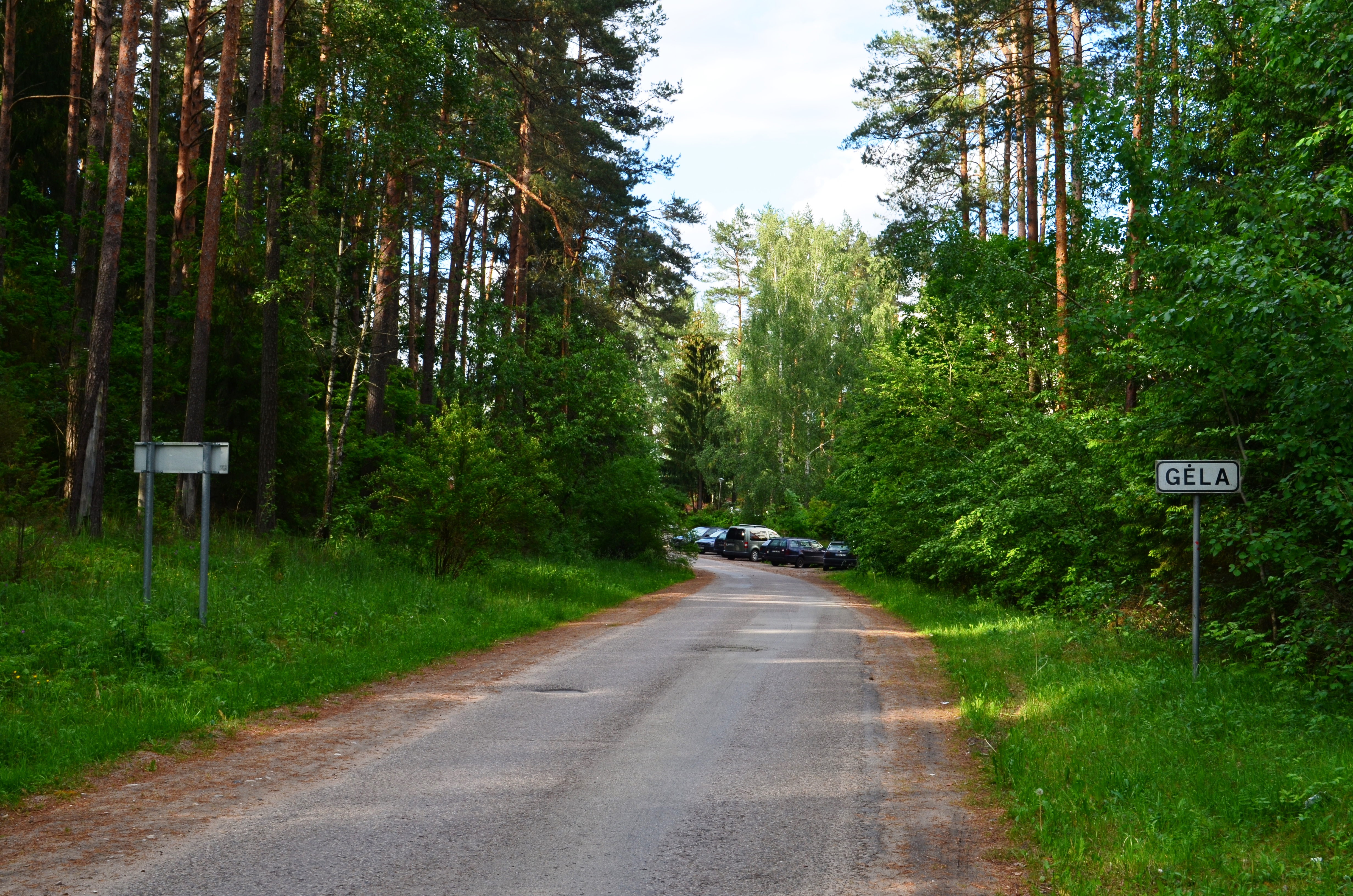 Gėla, Vilniaus raj.